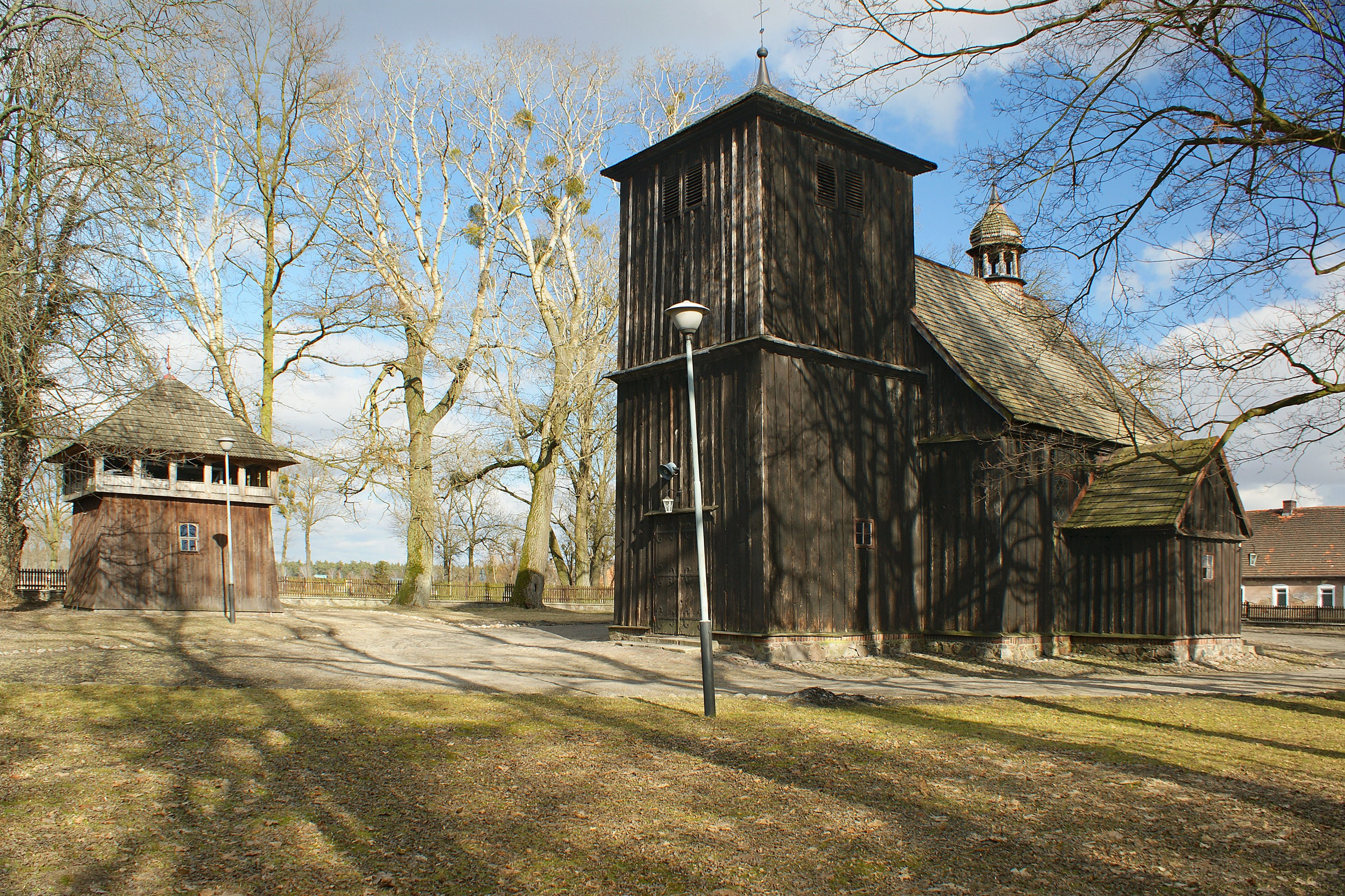 Górzno - drewniany kościół parafialny św. Mateusza z 1755 r. (zabytek nr kl.-IV-73/54/54)